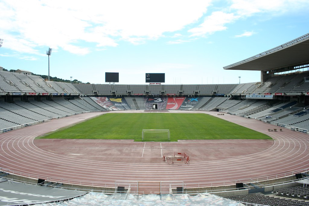 Estadi Olímpic de Montjuïc - Barcelona's 1992 Olympic Stadium